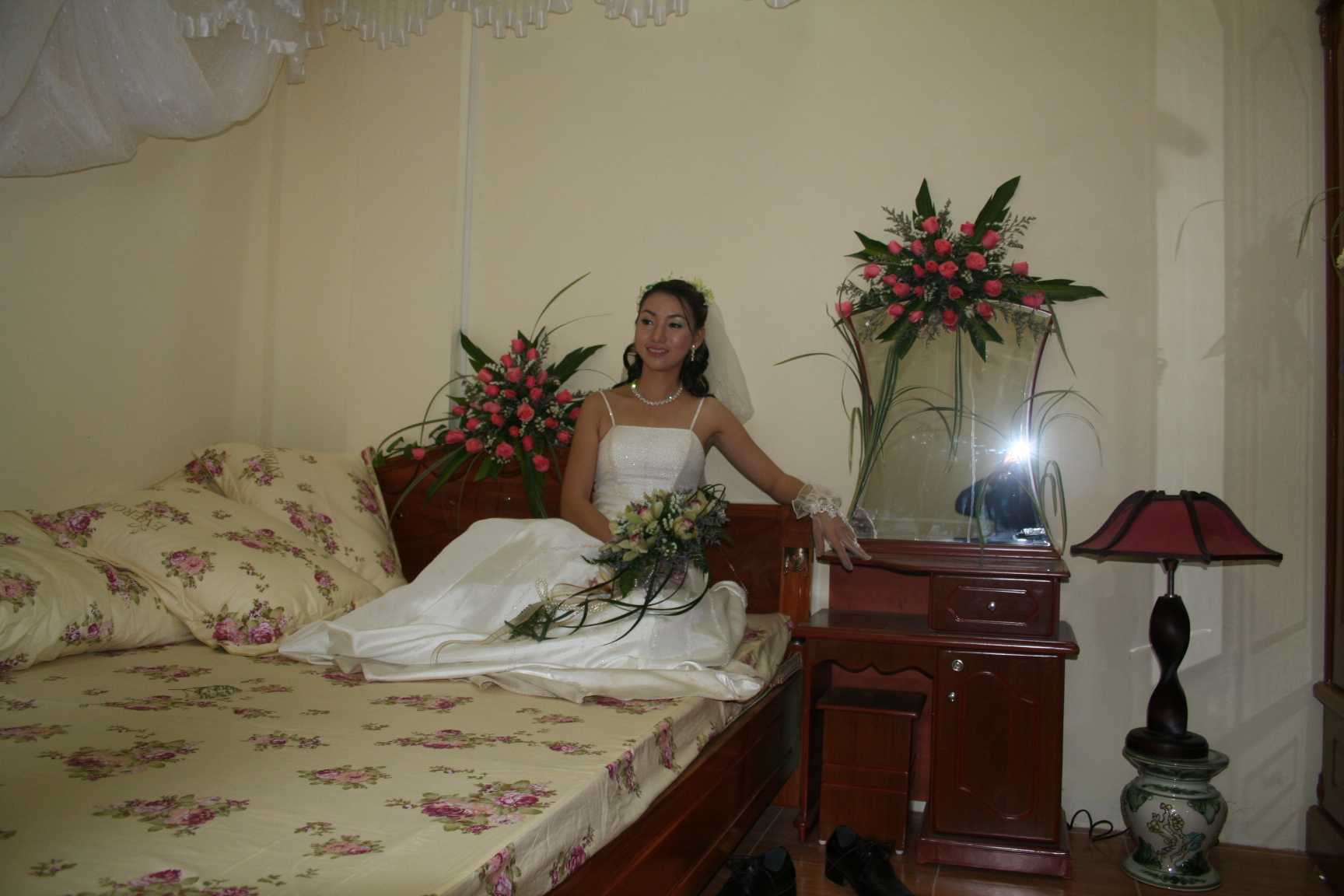 Phòng cưới, truyền lại vì bị hỏng link